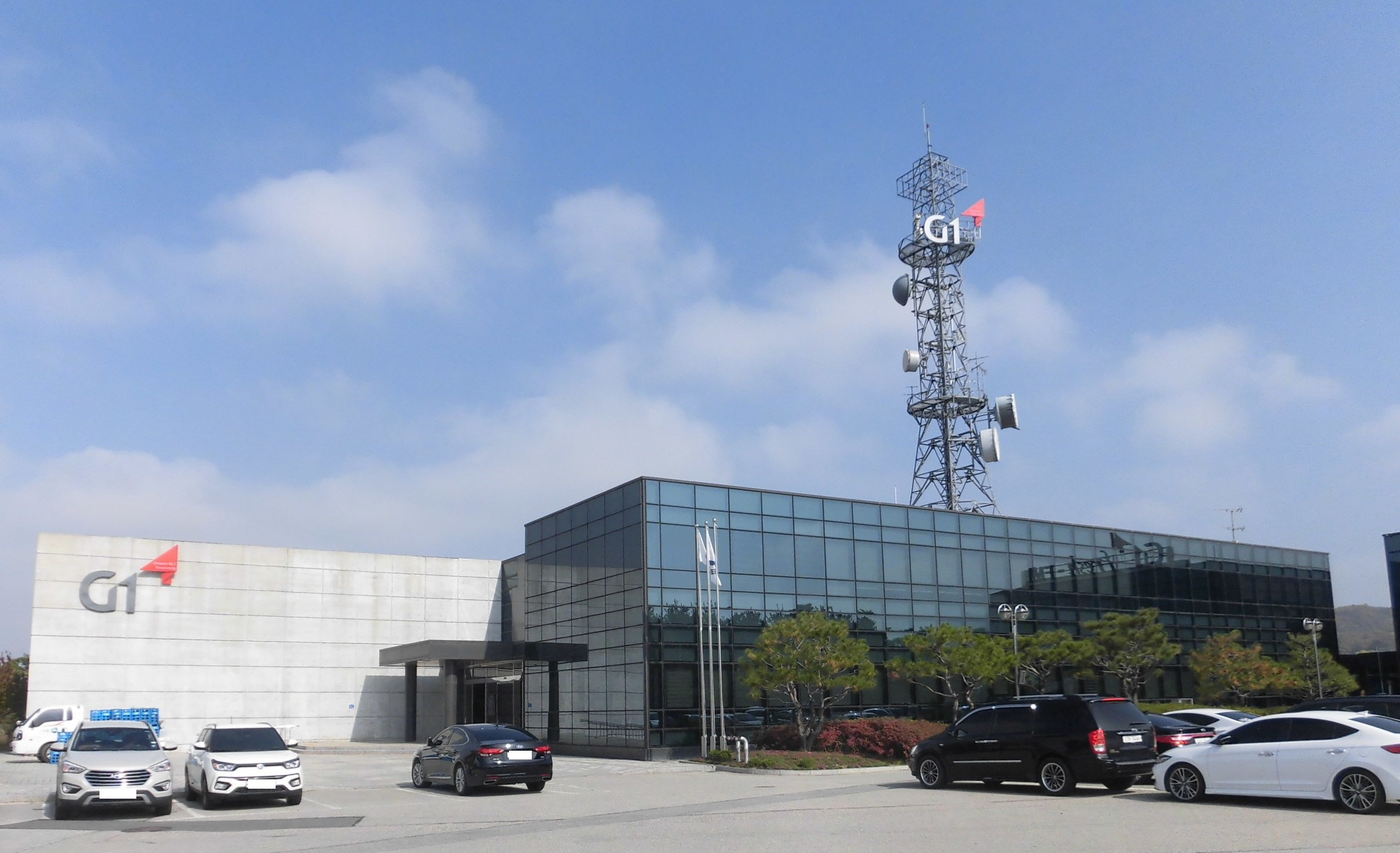 강원도 춘천시에 있는 강원민방